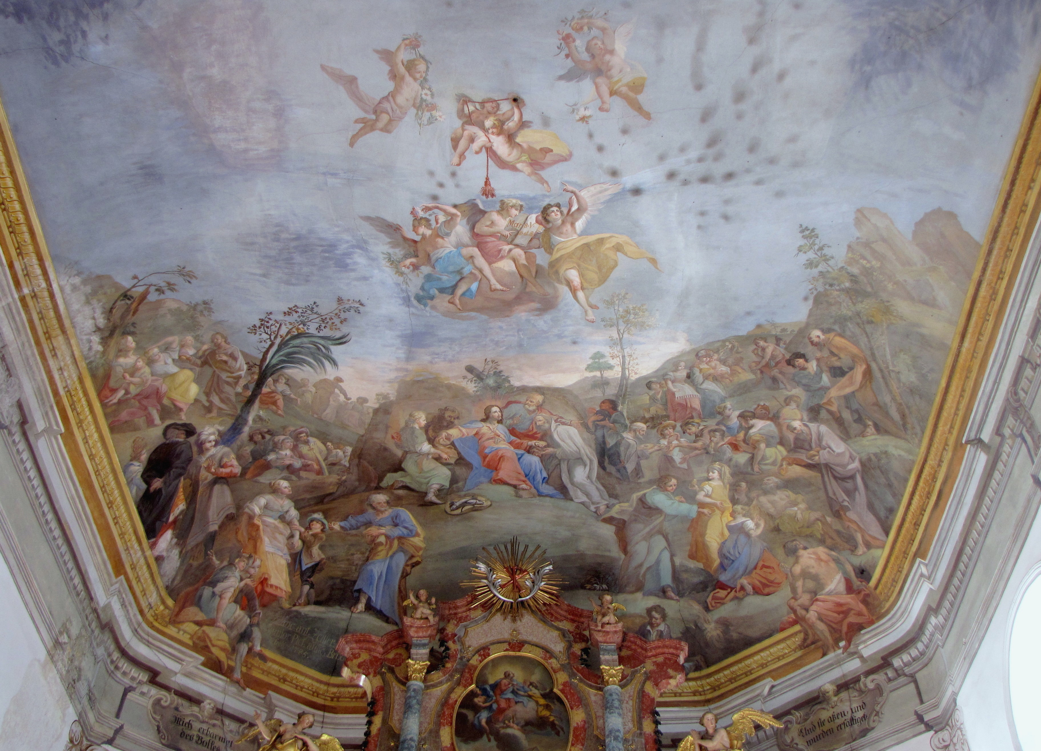 Chorfresko von Franz Anton Zeiller in der Pfarrkirche von Bichlbach, 1785